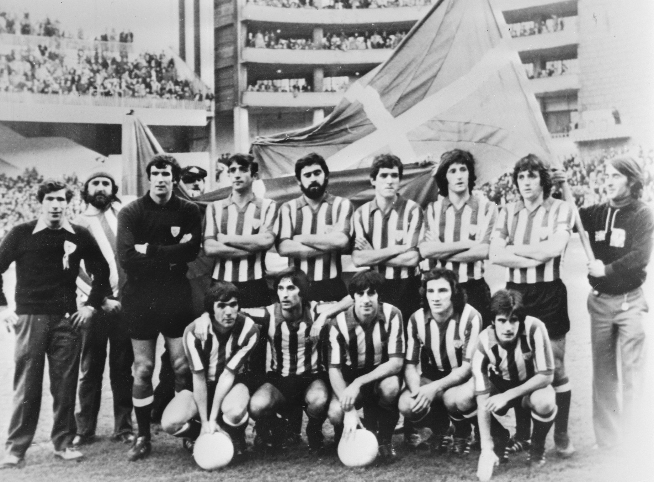 Collectie / Archief : Fotocollectie Anefo Reportage / Serie : Halve finale UEFA Cup RWD Molenbeek - Athletic de Bilbao (1977) Beschrijving : Elftalfoto Athletic de Bilbao (archief) Datum : 4 april 1977 Locatie : Bilbao, Spanje Trefwoorden : Europacup, UEFA Cup, voetbal Fotograaf : [onbekend] Auteursrechthebbende : Nationaal Archief Materiaalsoort : Negatief (zwart/wit) Nummer archiefinventaris : bekijk toegang 2.24.01.04 Bestanddeelnummer : 929-1073